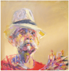 Selbst, 2008 (60x60)